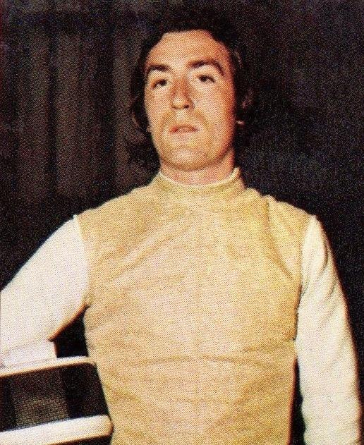 Bernard Talvard en 1975 (anno prima delle Olimpiadi), 'Montreal 76', Panini figurina n°193.